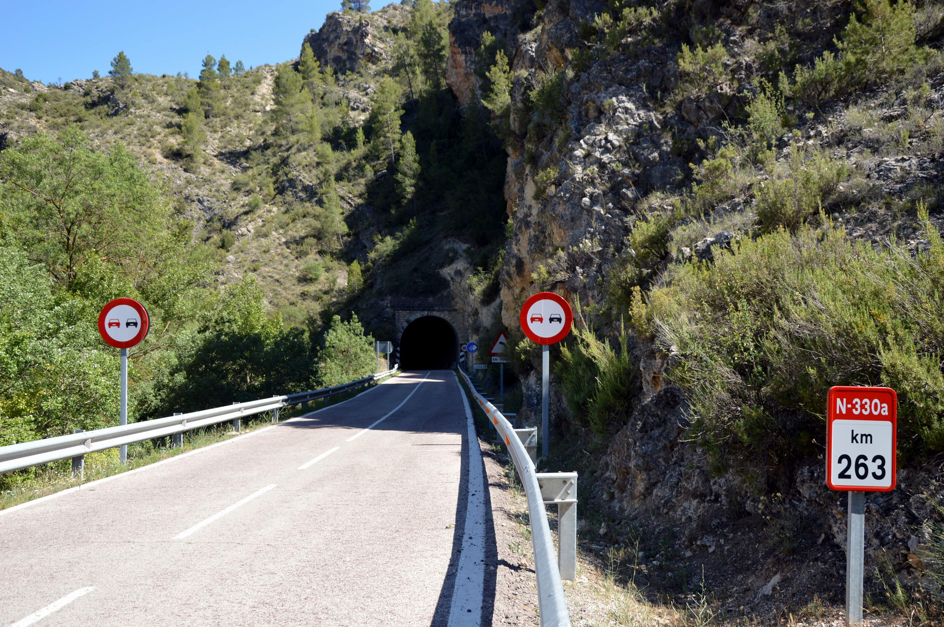 Detalle de punto kilométrico en la N-330a en Casasbajas (Valencia), con la entrada al túnel 1 (del Rayuelo), 2018.